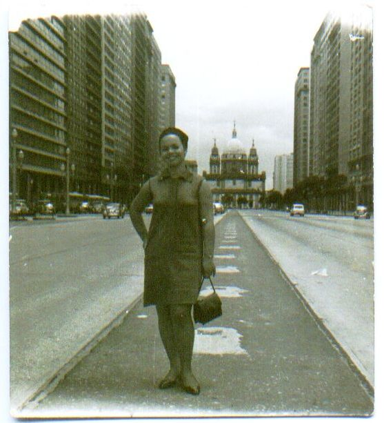 Avenida Presidente Vargas, foto antiga.